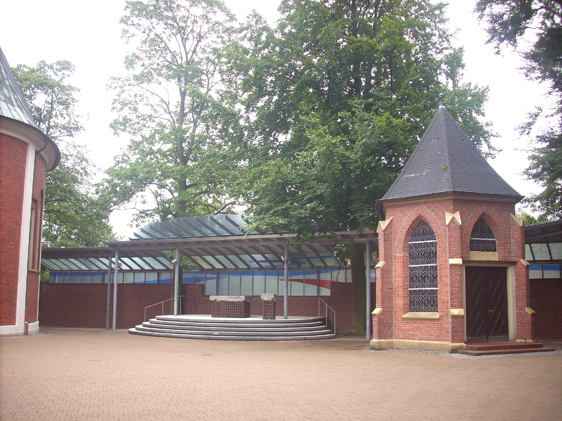 Bethen, Außenaltar und St.-Antonius-Kapelle